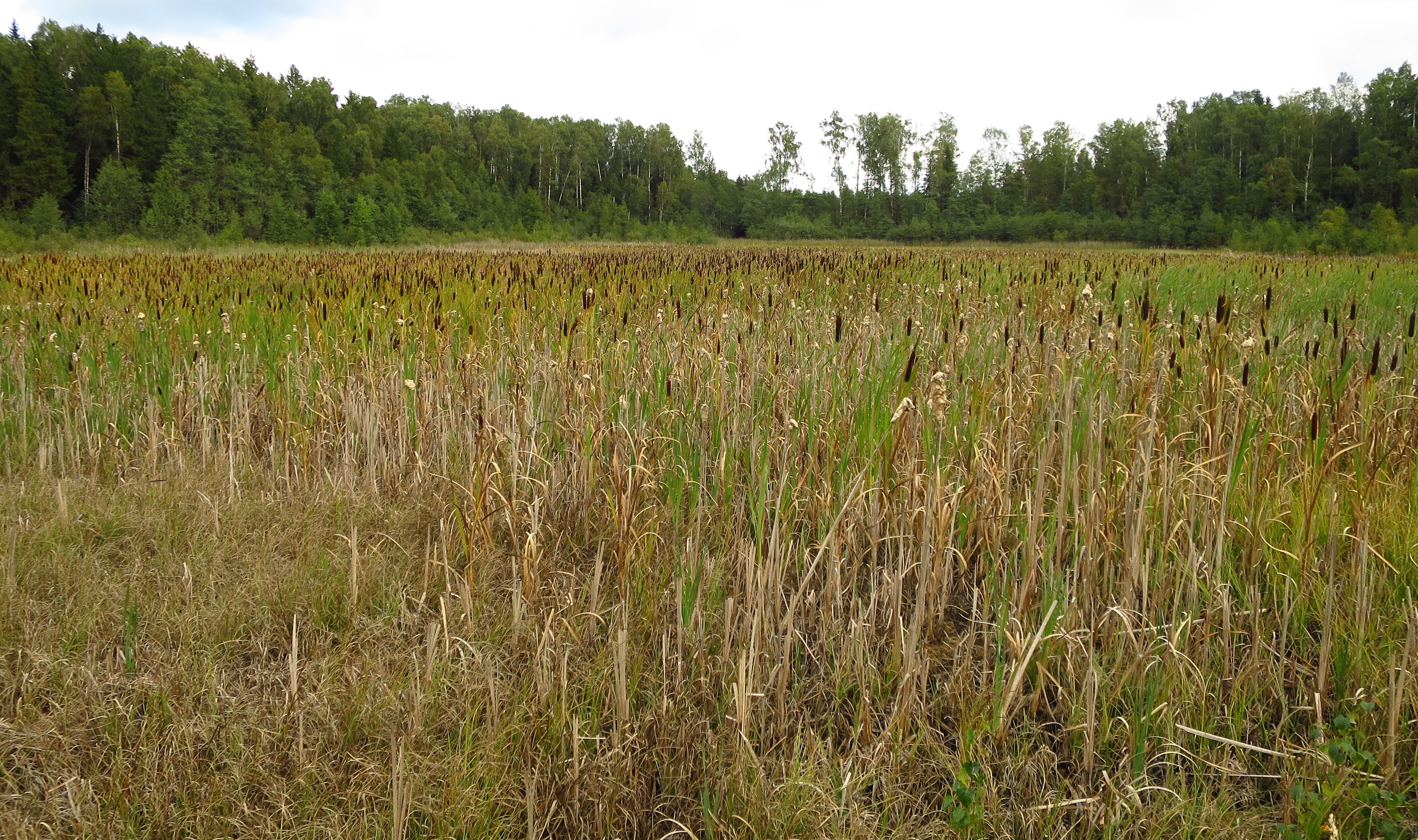 Kuivanud Kihljärv